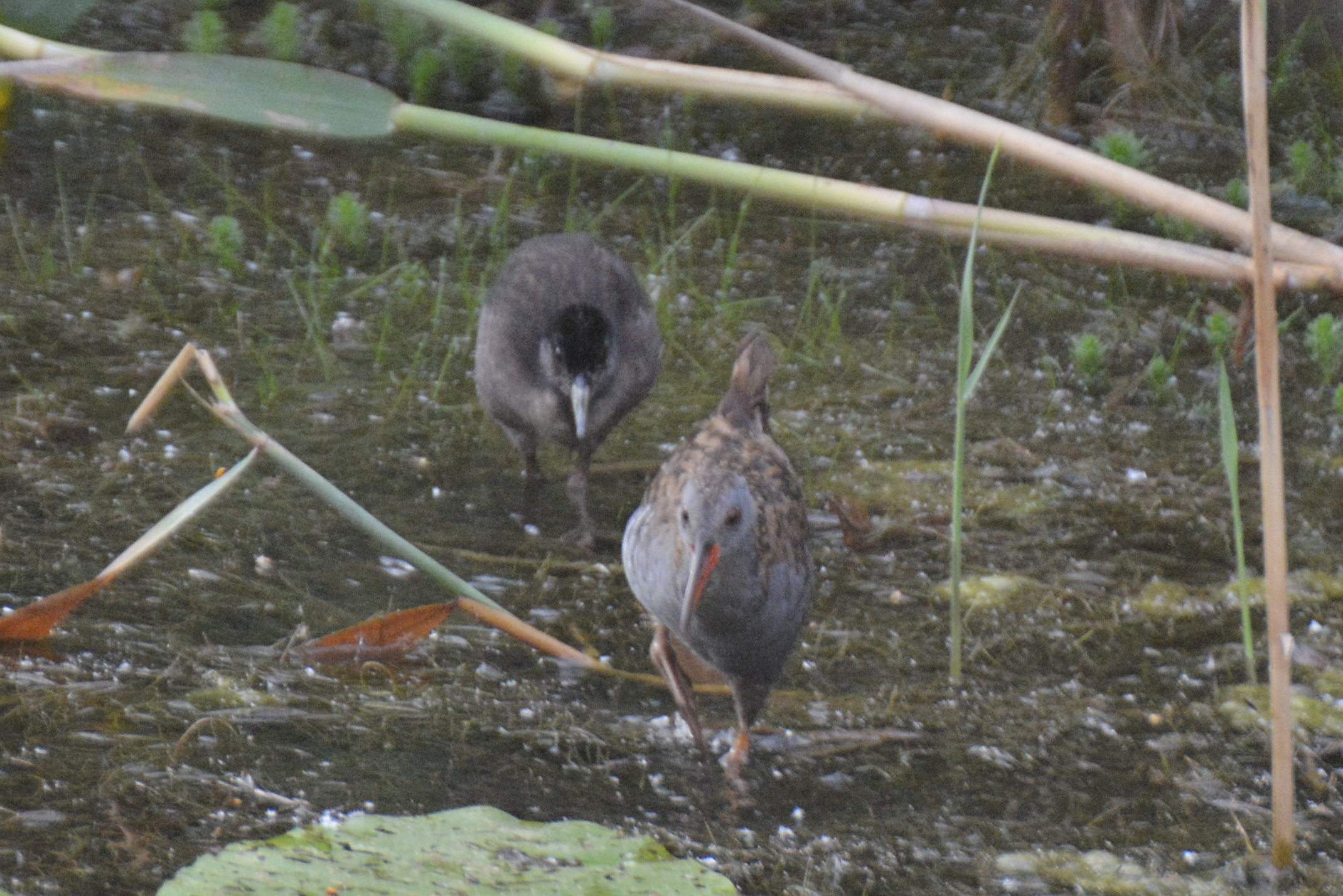 Wasserralle mit Nachwuchs auf Nahrungssuche